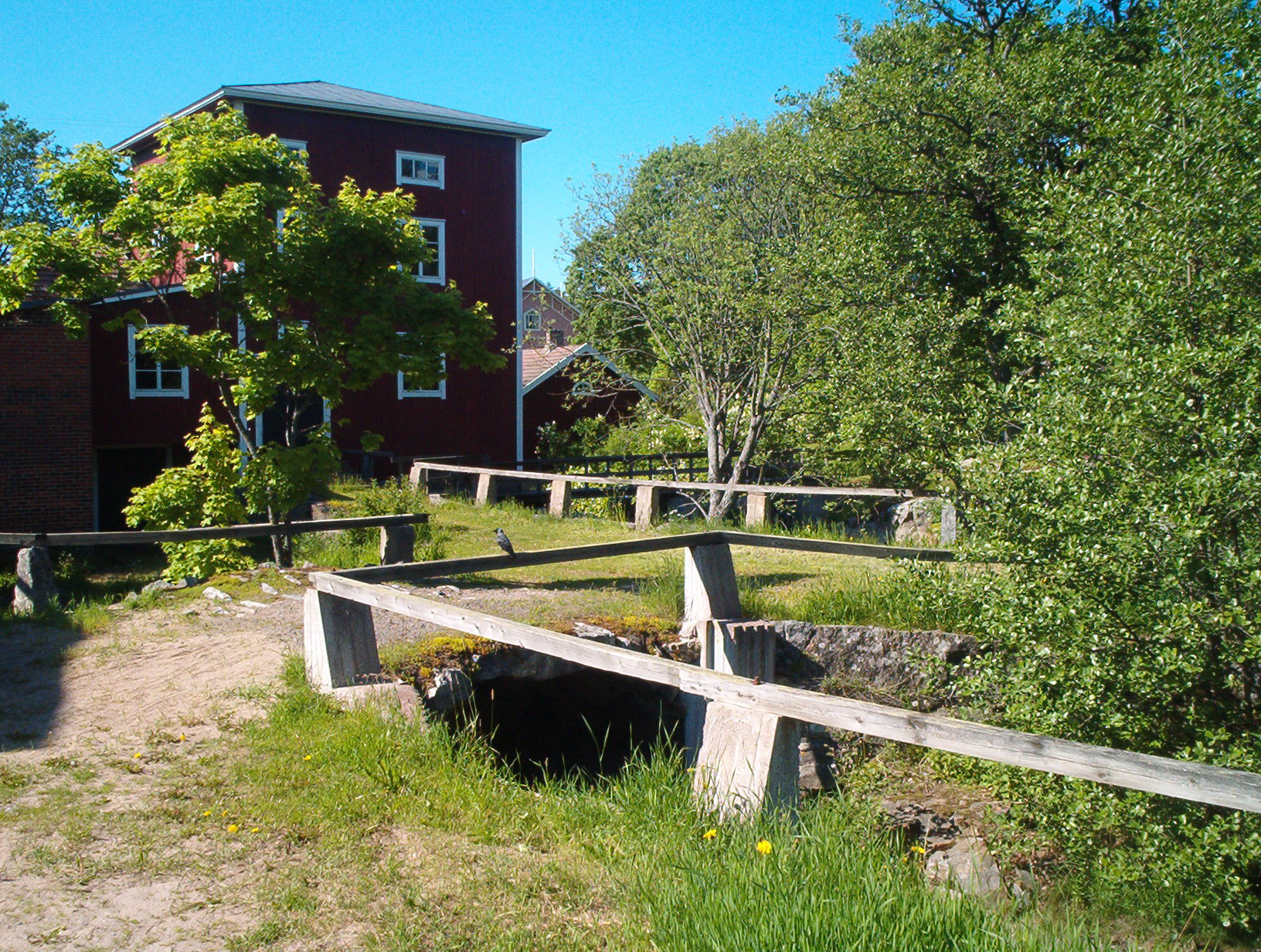 Männäisten ruukki Sirppujoella Kalannissa